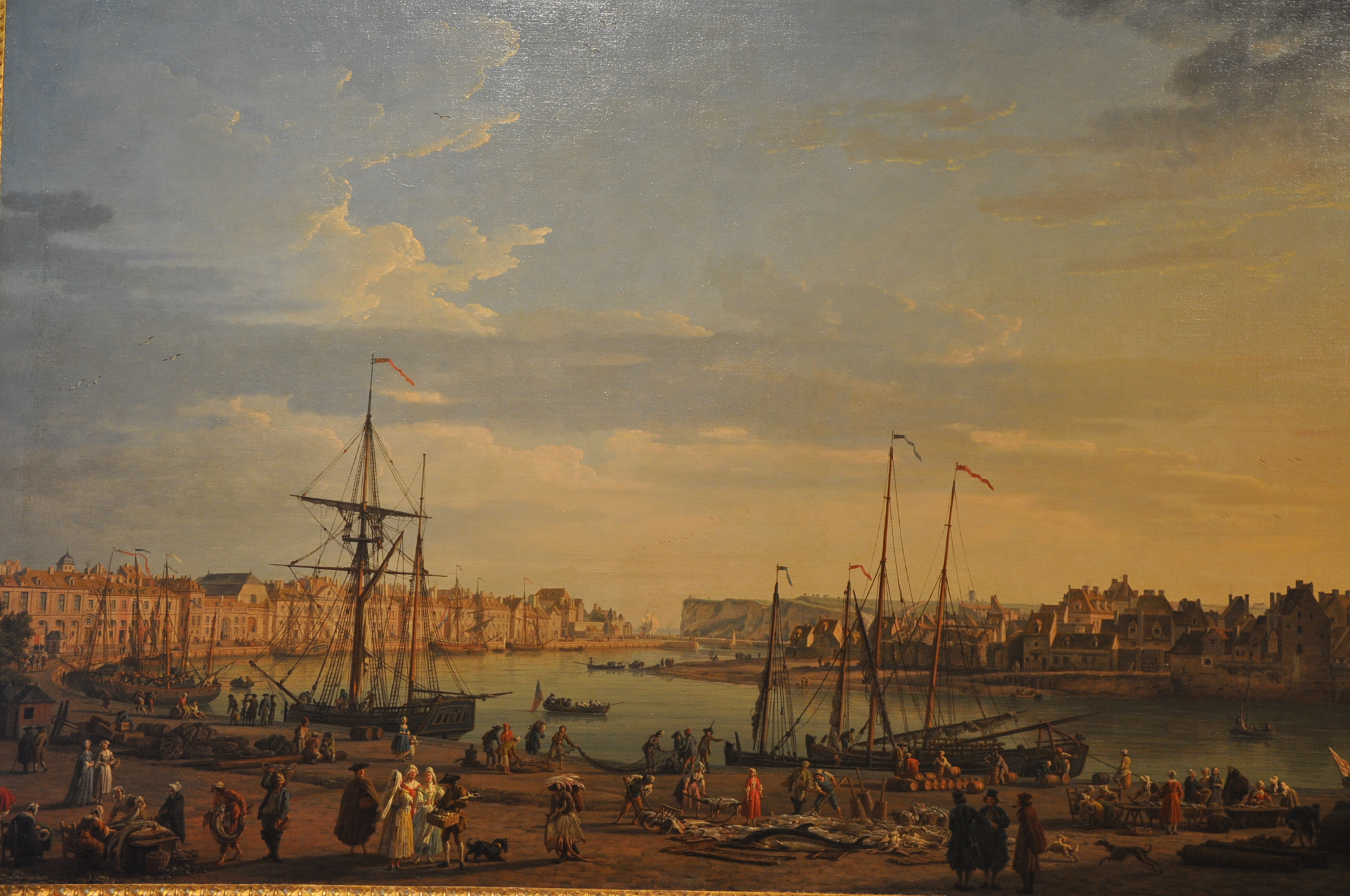 harbor of Dieppe (France, Normandy)label QS:Len,"harbor of Dieppe (France, Normandy)" label QS:Lde,"Der Hafen von Dieppe (Frankreich, Normandie)" label QS:Lfr,"port de Dieppe (Seine-Maritime)"